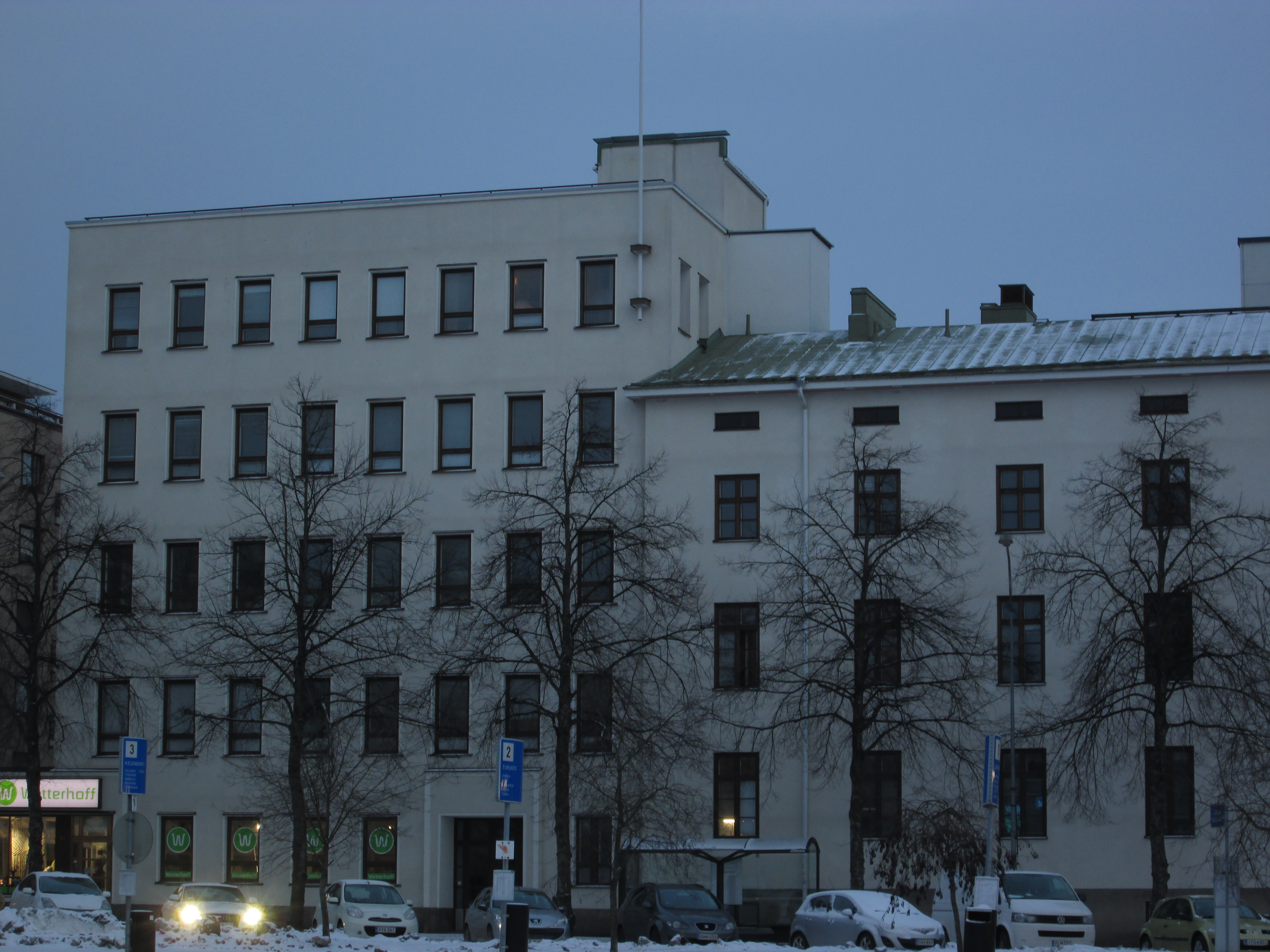 Entinen Wetterhoffin kotiteollisuusopiston talo